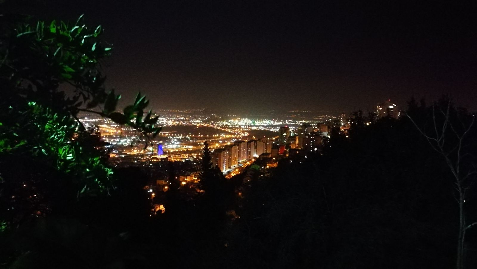 מעמדת התצפית בגן אלנבי ניתן לראות את מפרץ חיפה והסביבה